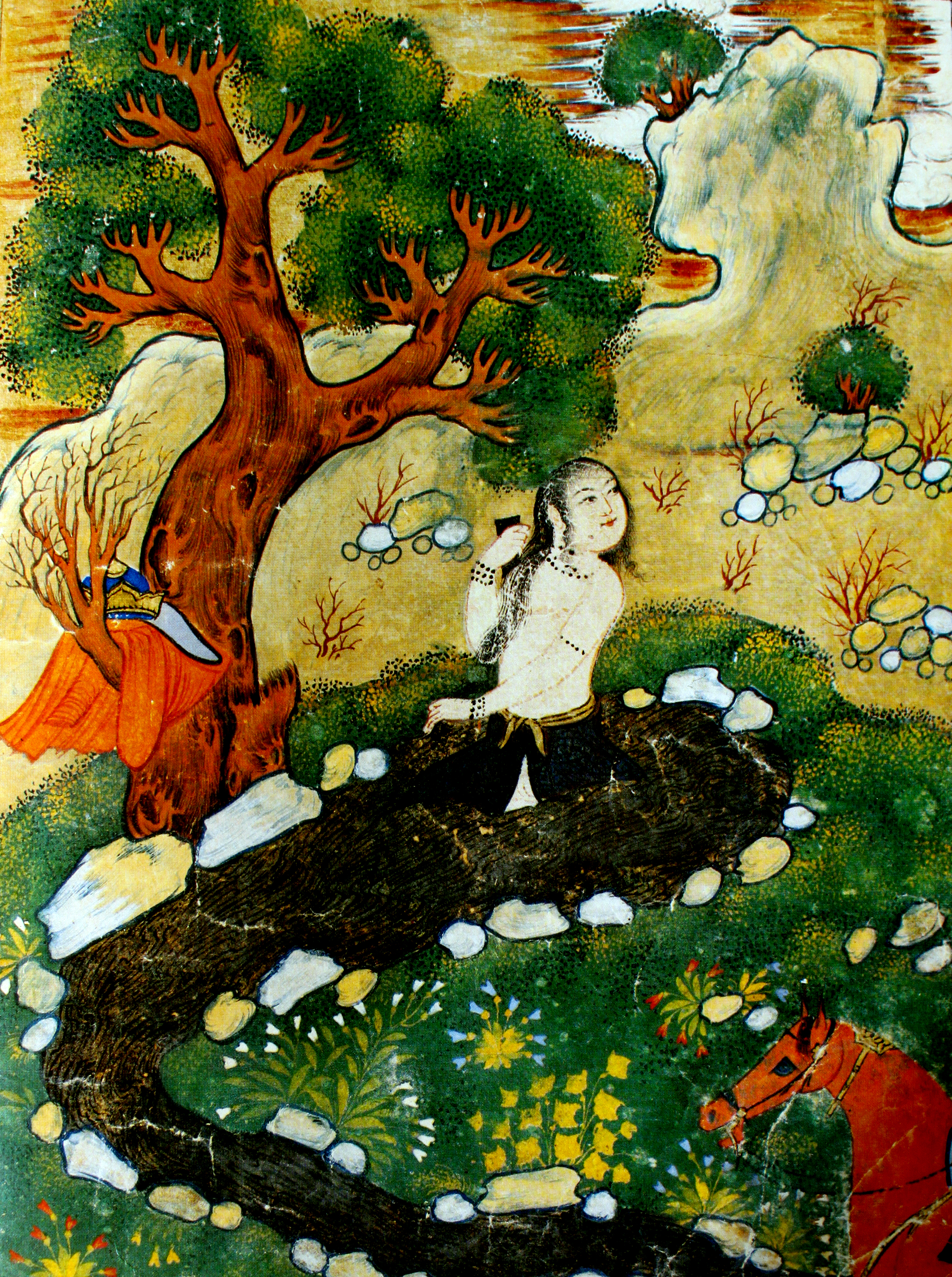 Şirin çimərkən, 1636, İsfahan, Bakı